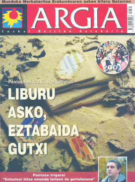 Argia